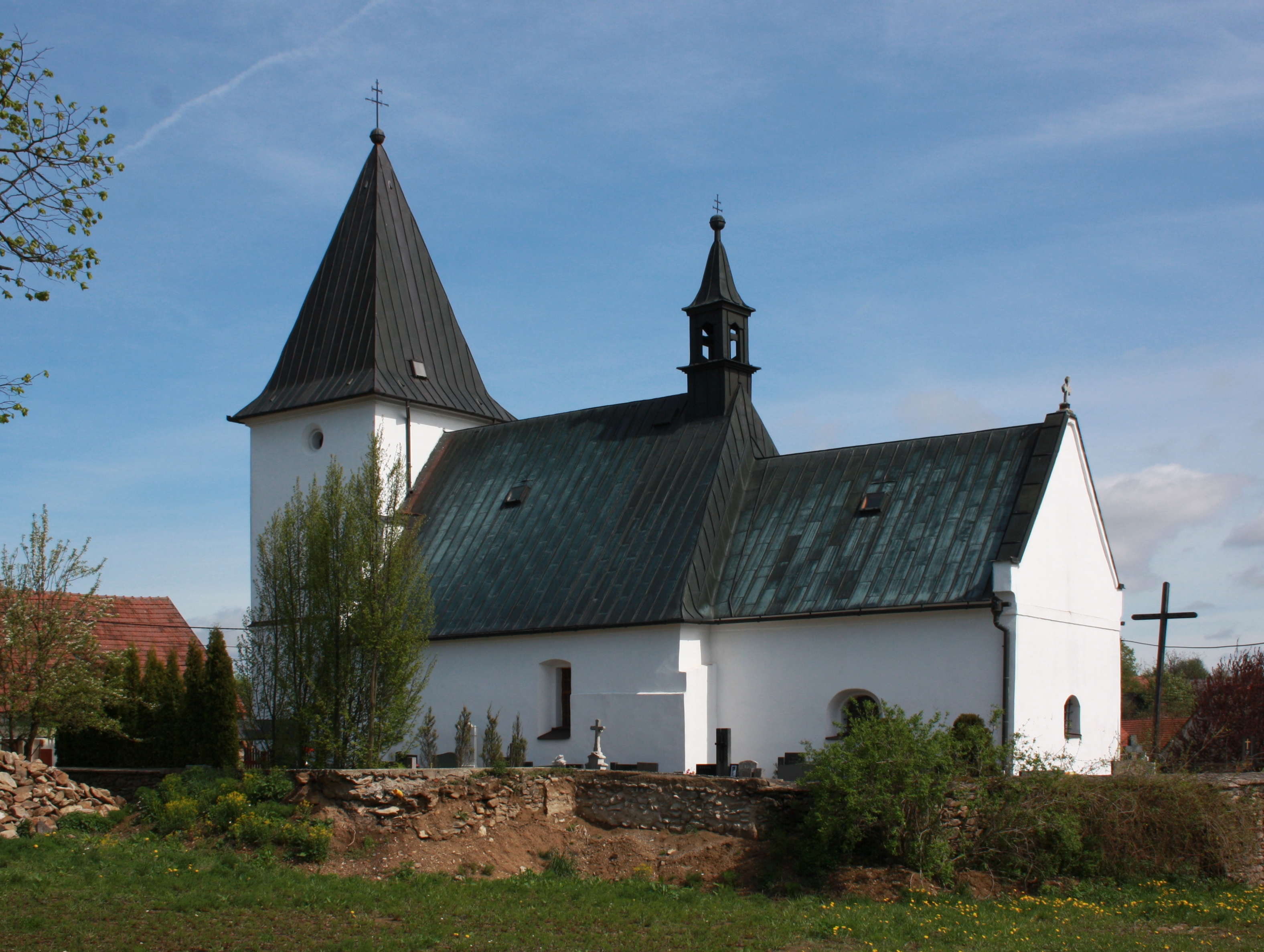 Bukov - kostel svatého Jakuba Většího, původně raně gotický z 13. století, upraven roku 1857 This photograph was taken within the scope of the 'Czech Municipalities Photographs' grant. This photograph was taken with a DSLR from WMCZ's Camera grant.